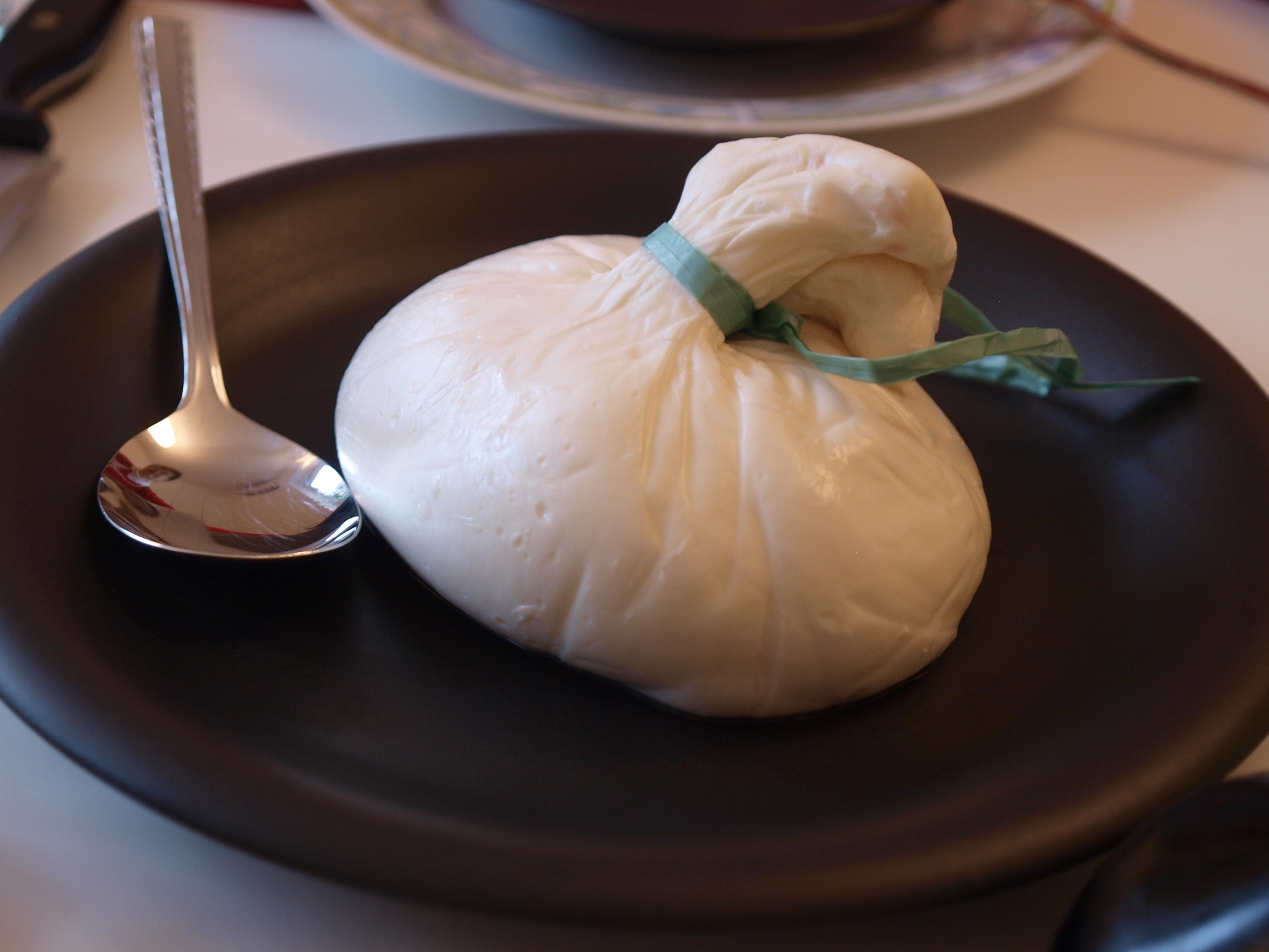 Burrata